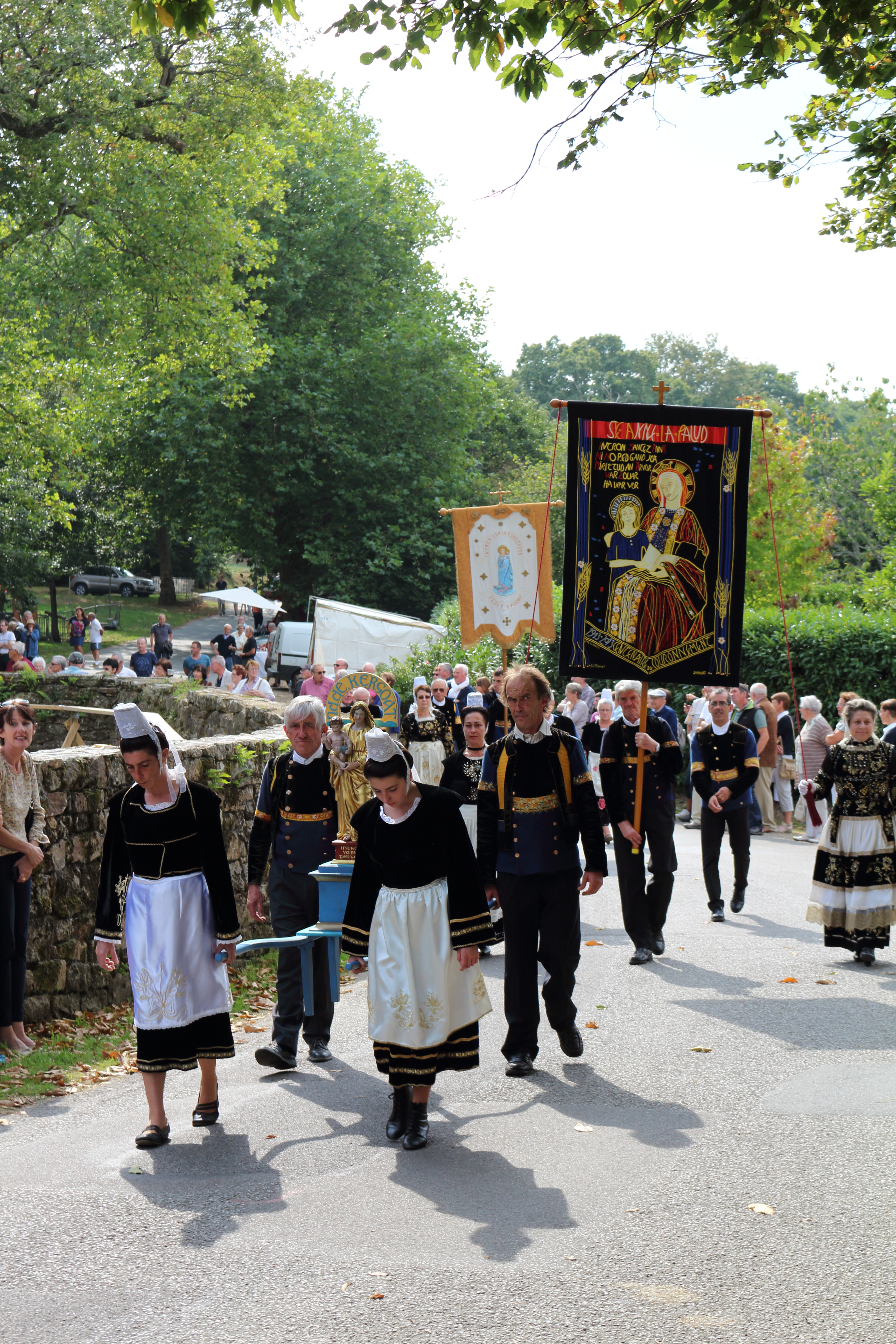 Procession du dimanche après-midi lors du grand pardon de Notre-Dame de Kerdévot, commune d'Ergué-Gabéric, Finistère, Bretagne, France.